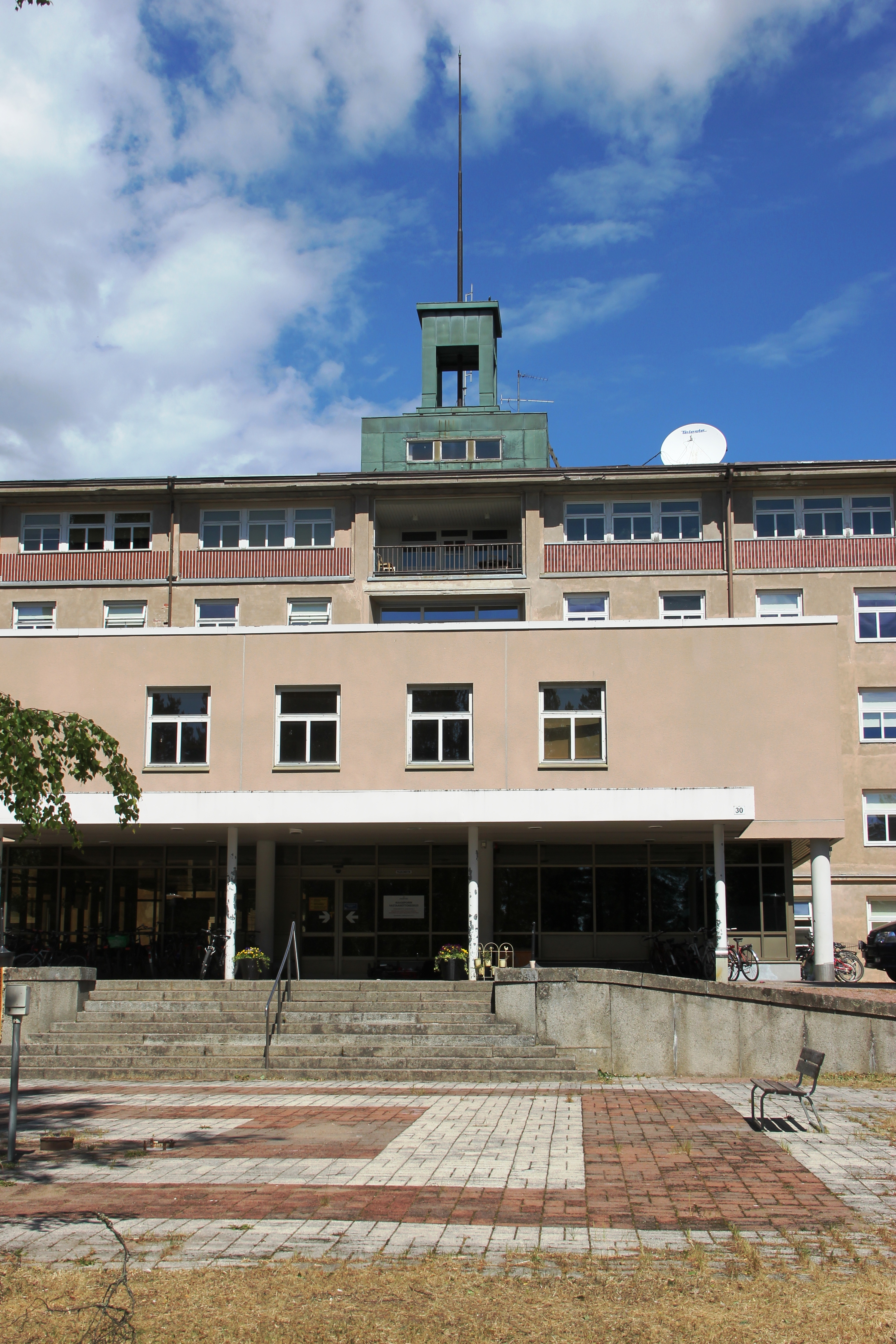 Meltolan sairaalan sisäänkäynti, Karjaa, Raasepori, Suomi